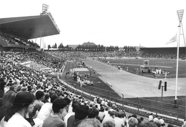 Berlin, Friedrich-Ludwig-Jahn-Sportpark ADN-ZB Oberst 8.7.87 Berlin: 25. Olympischer Tag der Leichtathleten-Weltklasse-Athleten aus 25 Ländern gaben sich beim 25. Olympischen Tag der Leichtathleten im mit 20.000 Zuschauern ausverkauften rekonstruierten Jahn-Sportpark ein Stelldichein.